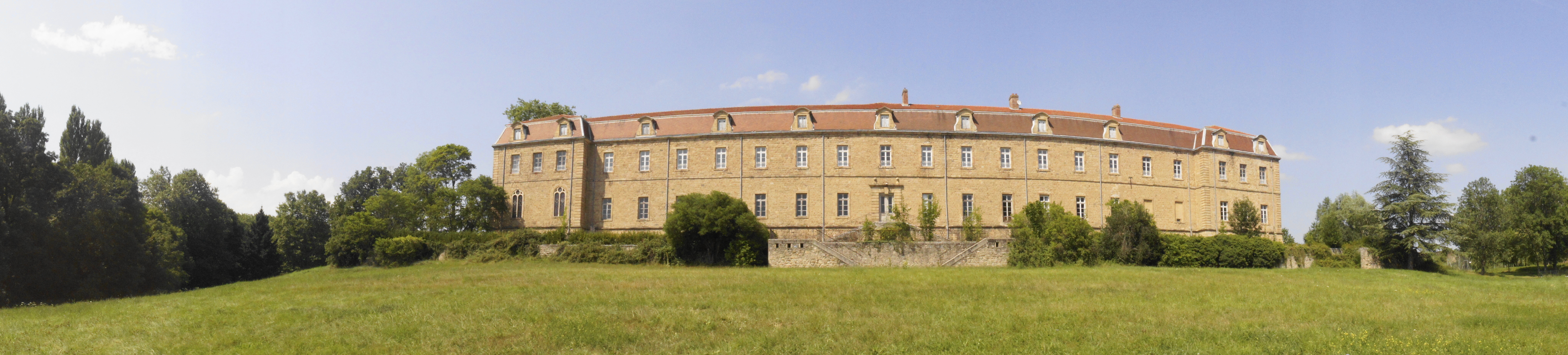 vue panoramique du château des Célestins